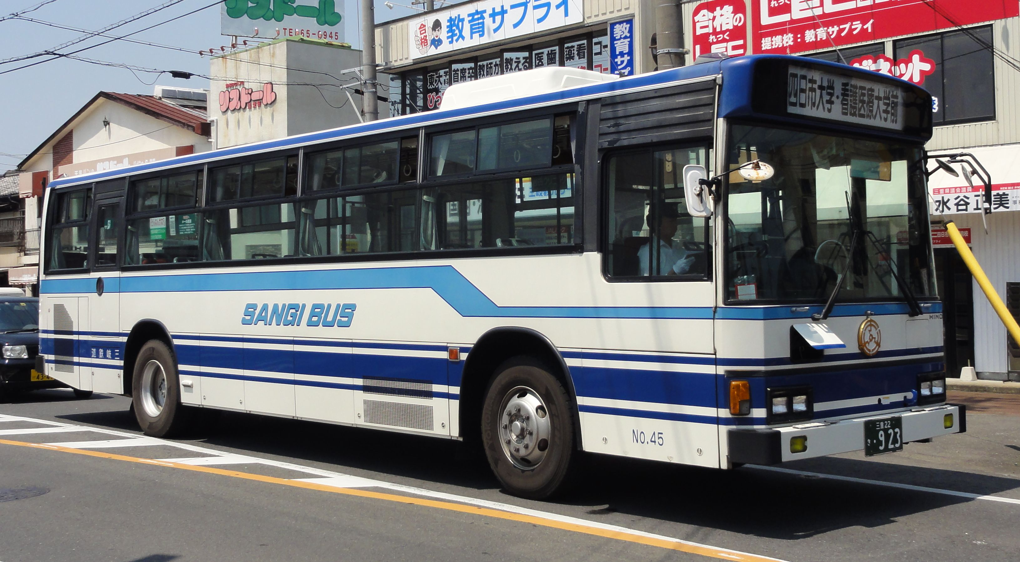 三岐鉄道バス